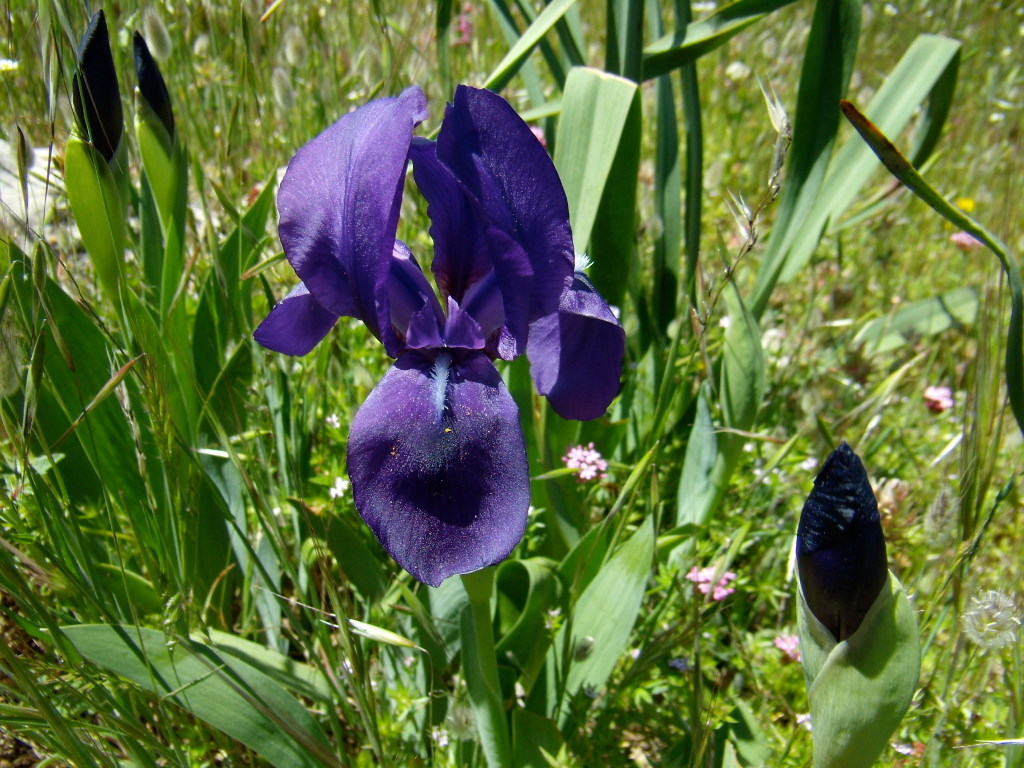 Sierra Blanquilla